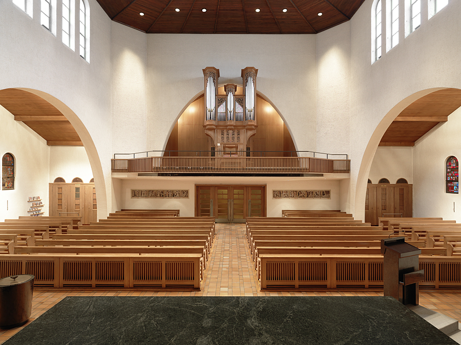 Römisch-katholische Kirche St. Martin, Zürich, Blick auf Orgel